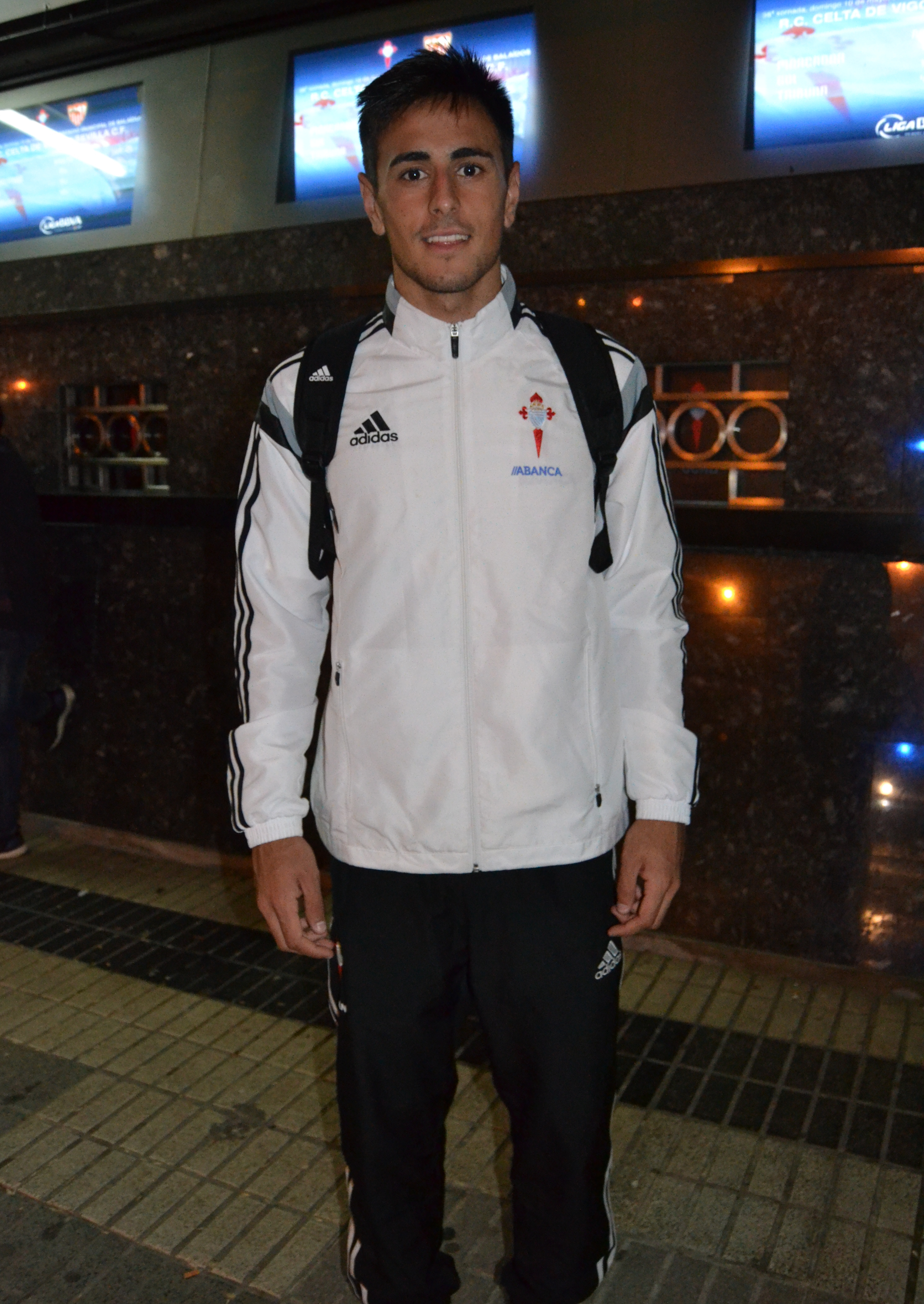 O futbolista David Costas